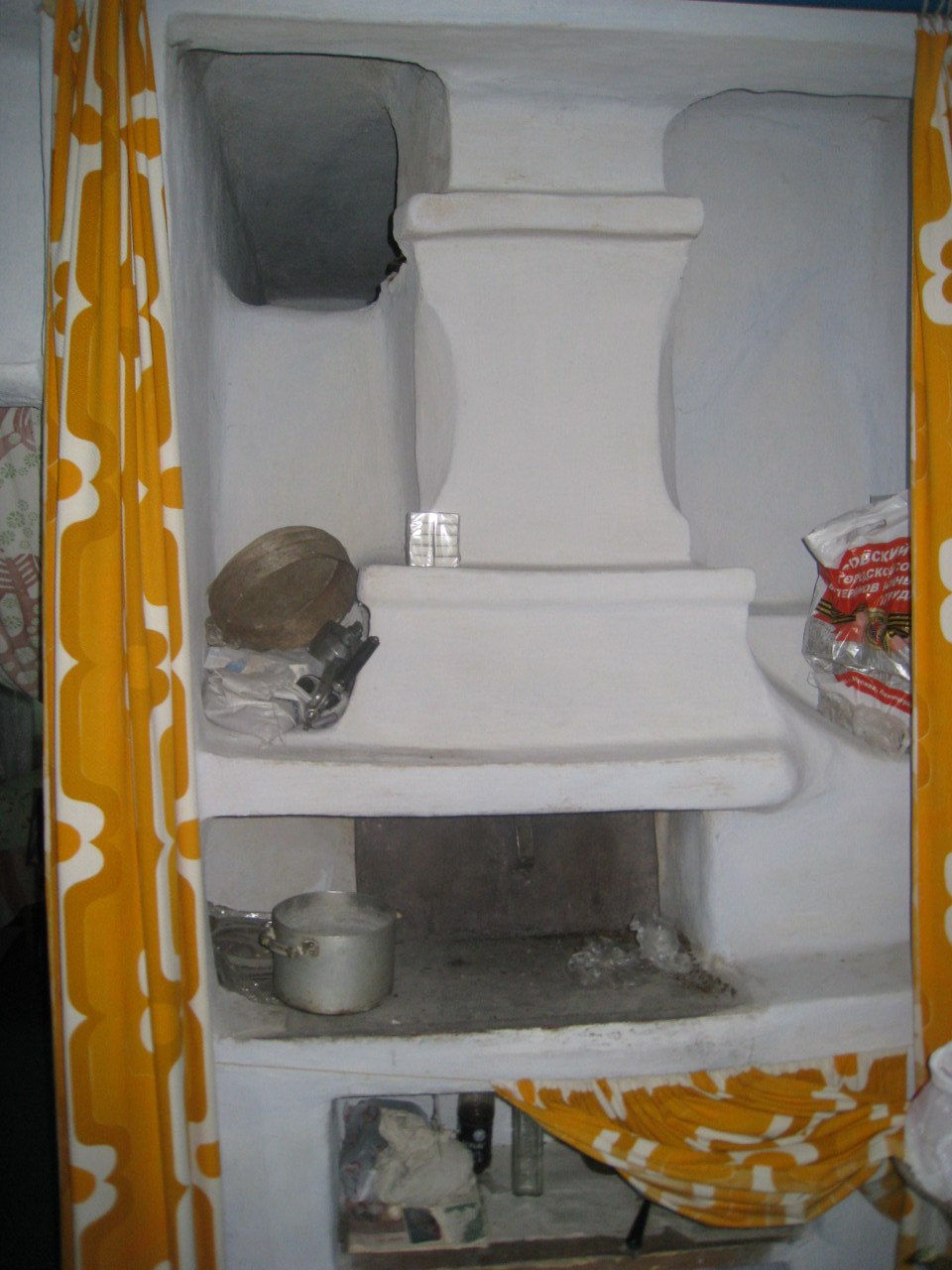 піч традиційна